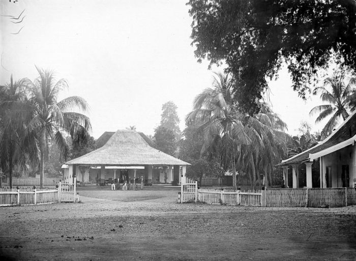 Negatief. Huis en tuin, Wedonoh Paton